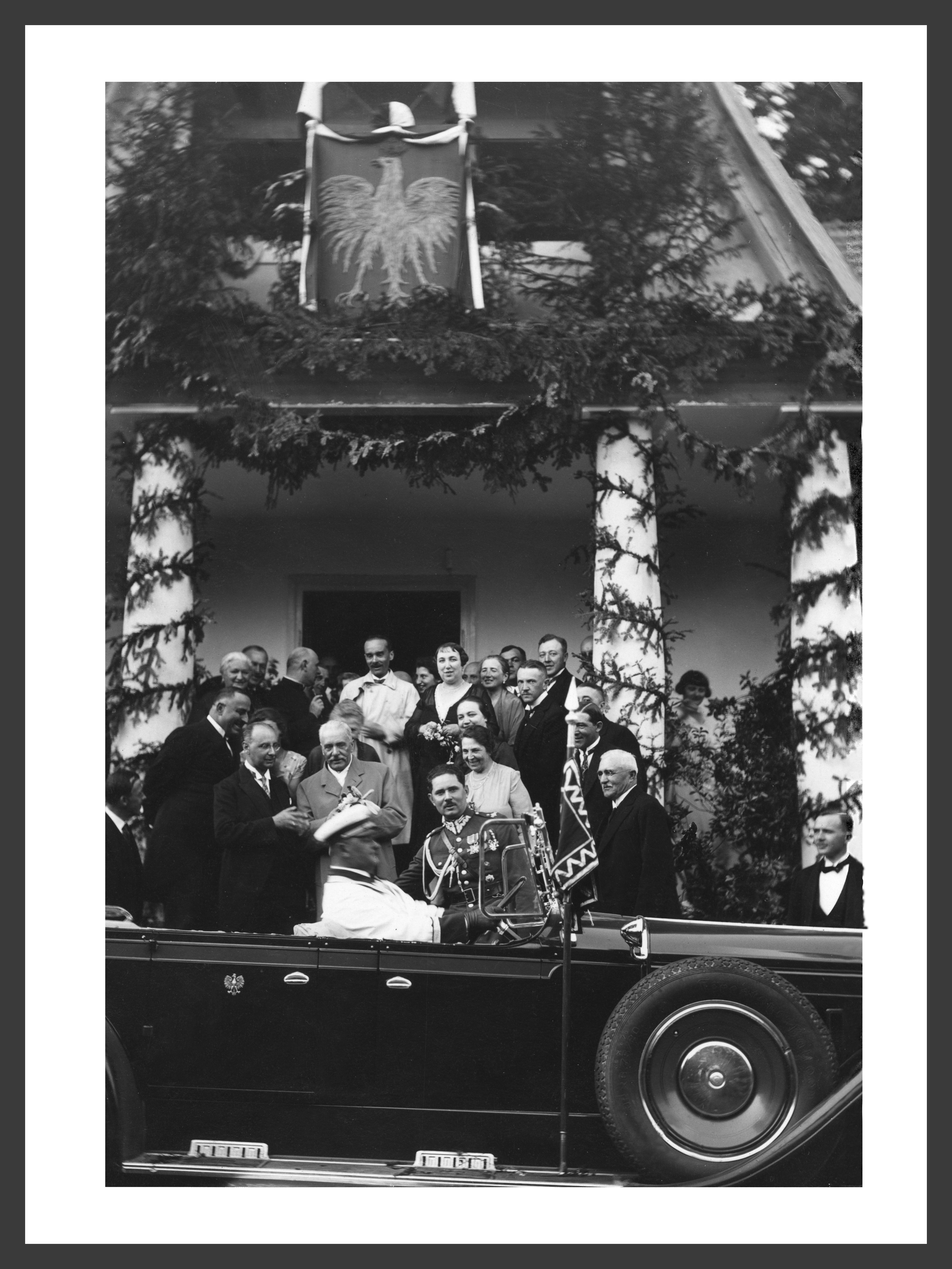 Wizyta prezydenta R.P. Ignacego Mościckiego w Wydrnej 21 lipca 1929. Stoją od lewej: Stanisławowa Grodzicka z Bzianki [Władysława z Jarzymowskich, żona Stanisława Grodzickiego], niżej Ksawery Dwernicki z Witryłowa [Franciszek Xawery Dwernicki], niżej prof. Kazimierz Kling z Wydrnej, obok prezydent Ignacy Mościcki, obok adiutant major [Kazimierz] Jurgielewicz, w prawo Stanisław Grodzicki z Bzianki, w prawo Józef Ostaszewski z Klimkówki, nad Stanisławem Grodzickim Lesław Dydyński z Krzemiennej, nad Lesławem Bolesław Dydyński z Dydni, obok w lewo Edward Sękowski z Wydrnej, nad nim Lesław Kozłowski z Lipy, obok Kazimierz Dwernicki z Temeszowa, obok Jadwiga Kozłowska z Lipy, obok Janiszewska z Leszczawy, obok Nina Kozłowska (żona Floriana) z Lipy, w trenczu wojewoda lwowski hr. [Wojciech Agenor] Gołuchowski, ksiądz Lech proboszcz w Dydni, za prezydentem (częściowo zasłonięta) Jadwiga Klingowa [z Sękowskich] - matka prof. Kazimierza Klinga z Wydrnej. W przyjęciu uczestniczyło ok. 70 osób - ziemiaństwo ziemi sanockiej. Prezydent prof. Ignacy Mościcki przyjechał do Wydrnej, by osobiście podziękować prof. Klingowi za wyrażoną zgodę przeniesienia się z Uniwersytetu Jana Kazimierza we Lwowie do Warszawy i objęcia stanowiska dyrektora Instytutu Chemii. Byli bowiem bliskimi kolegami i razem wydawali dużo publikacji naukowych.